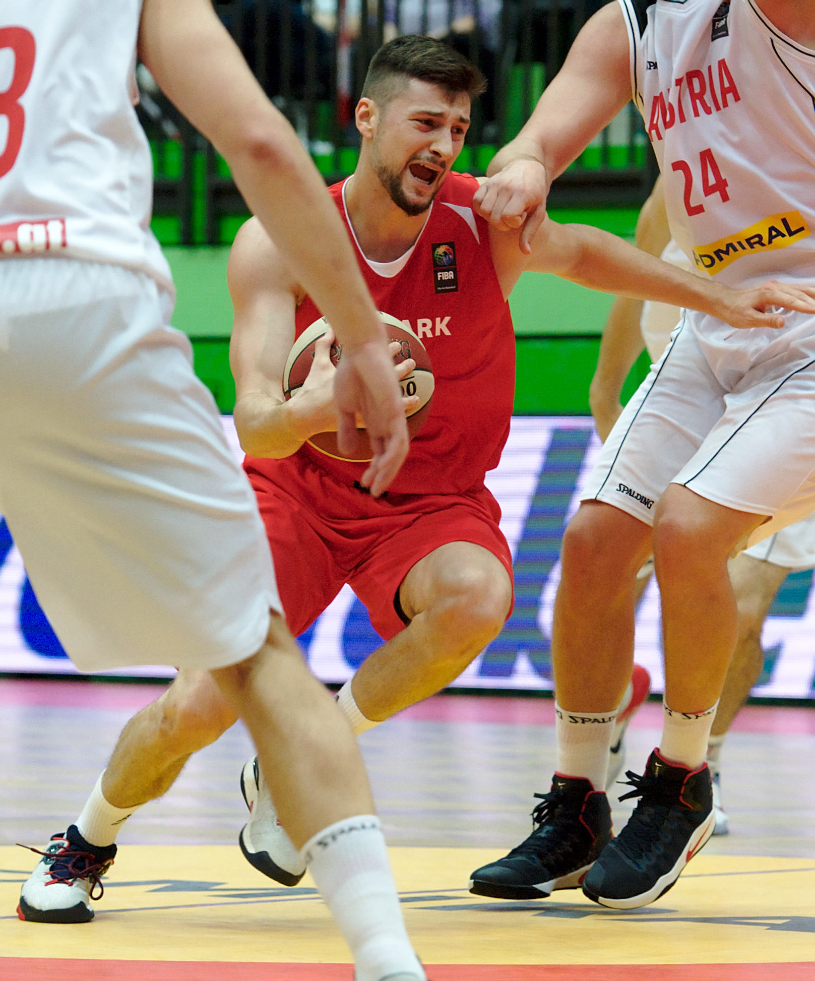 FIBA-Basketball EM-Qualifikation am 7.9.2016 im Multiversum in Schwechat, Österreich - Dänemark. Bild zeigt Darko Jukić (DEN).